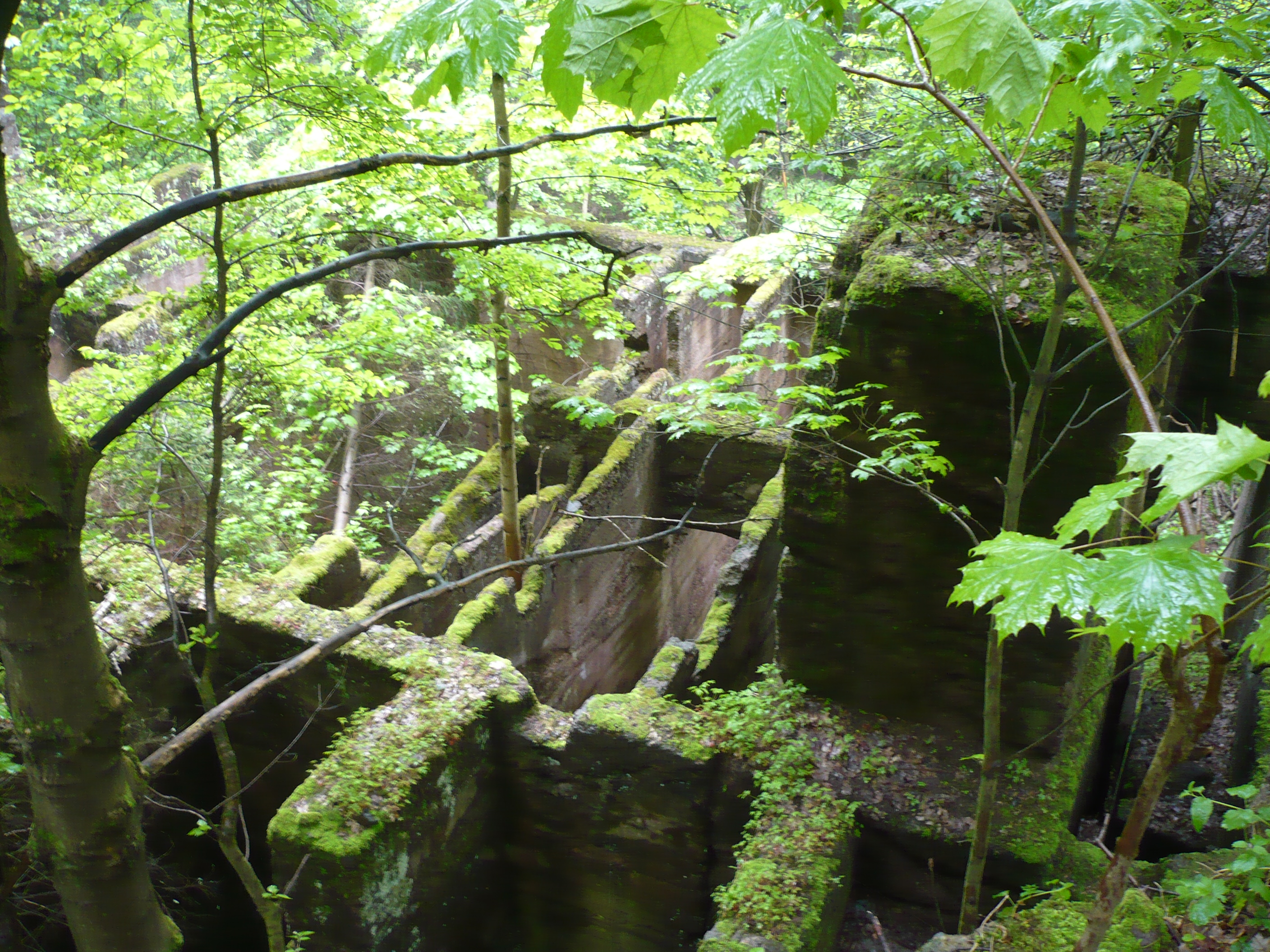 Włodzicka Góra. Obiekt do załadunku kamienia